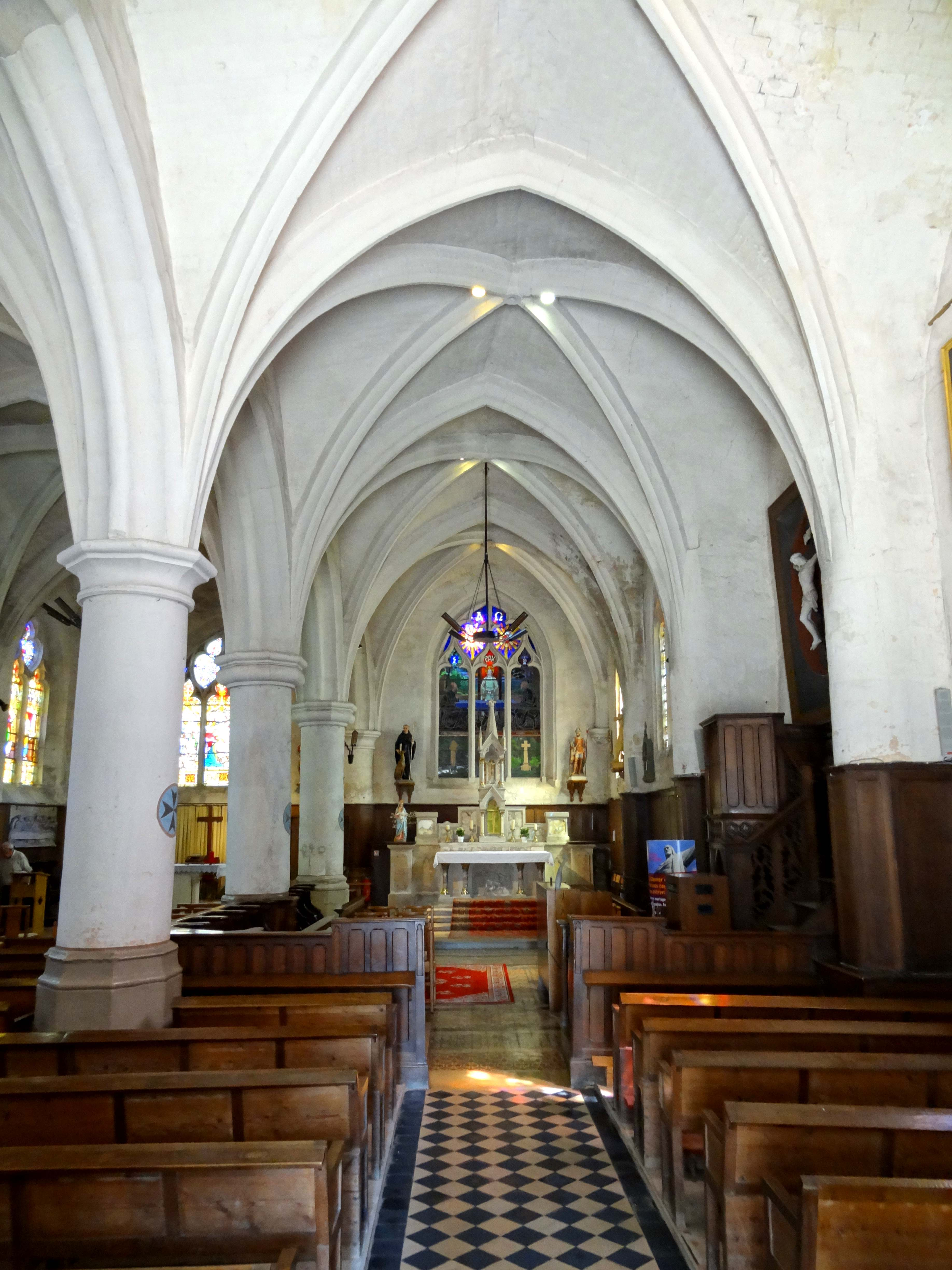 Intérieur de l'église - voir titre.